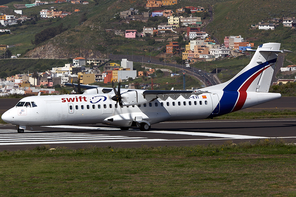 Swiftair rollt zur Startbahn